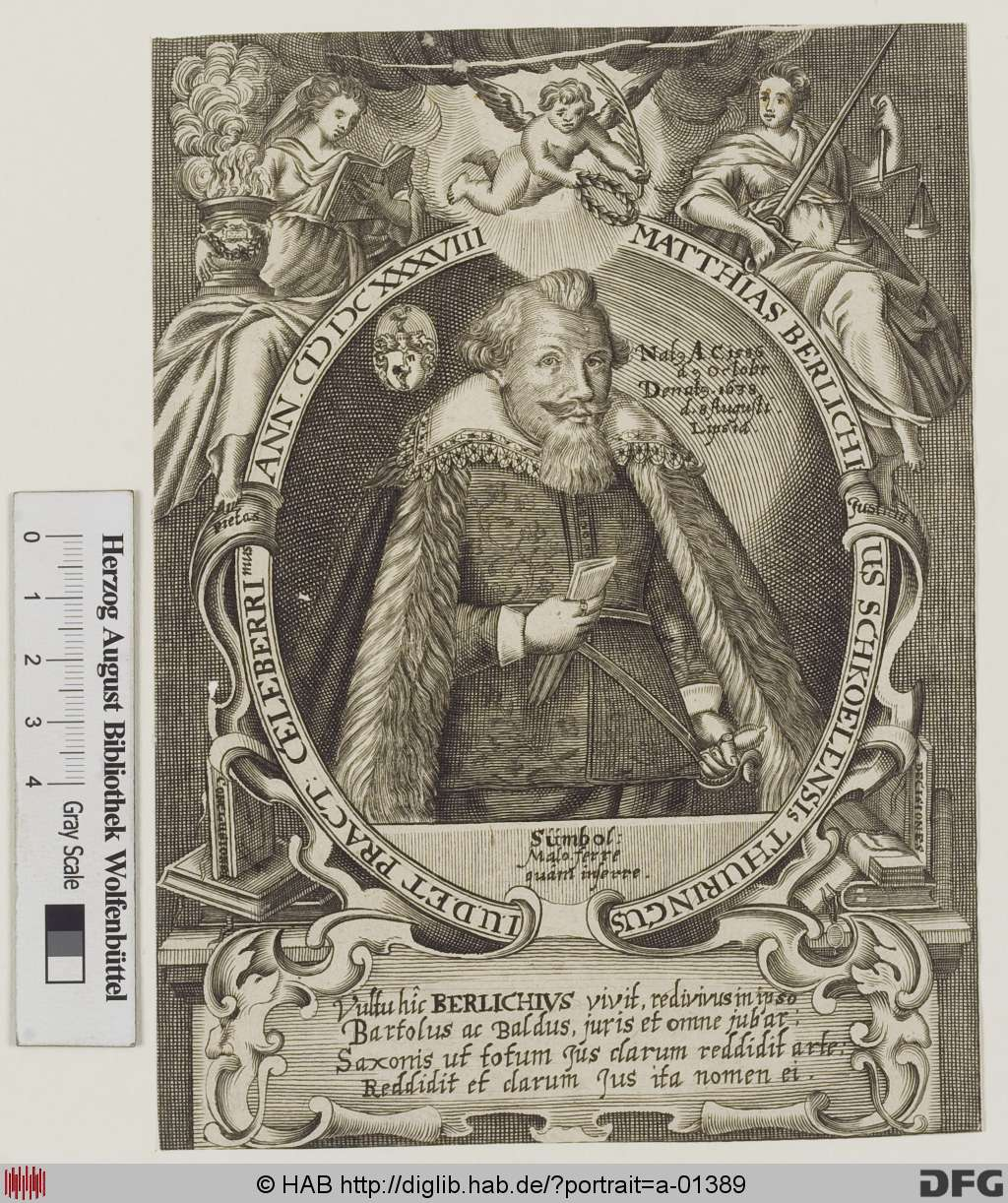 Berlich, Matthias (Dt. Jurist; Student in Jena und Marburg; Anwalt in Leipzig) Kupferstich 181 x 133 mm (Bild, Blatt)